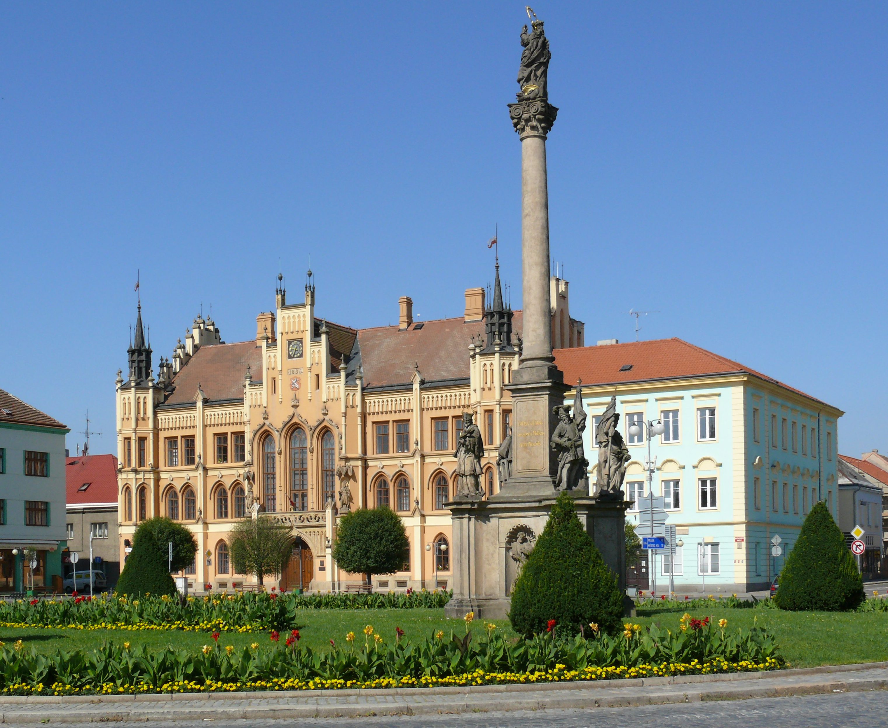 Novogotická radnice a mariánský sloup na náměstí v Novém Bydžově